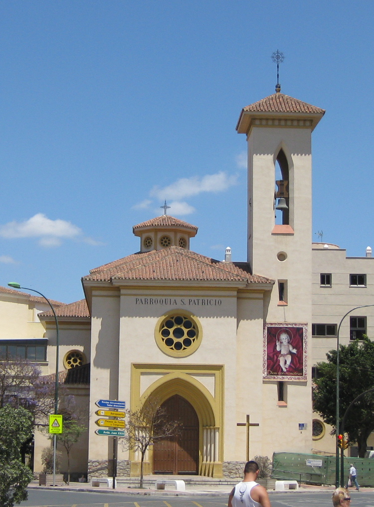 Iglesia de San Patricio, barrio de Huelein, Málaga, España. Obra de Fernando Guerrero-Strachan Rosado